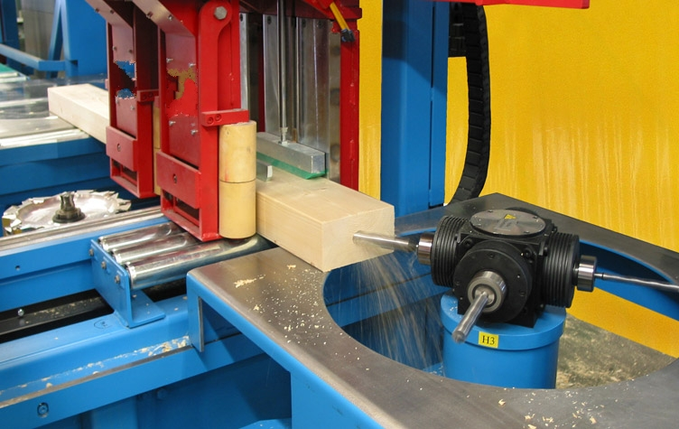 Revolverfräse zur Bestückung mit unterschiedlichen Werkzeugen